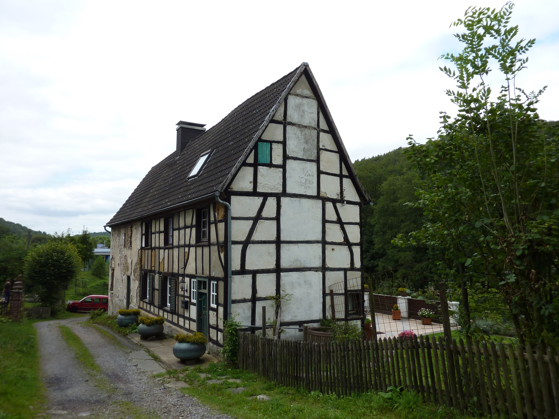 Sonderwohnhaus von Gut Ahlhausen an der EnnepeThis is a photograph of an architectural monument., no. 0